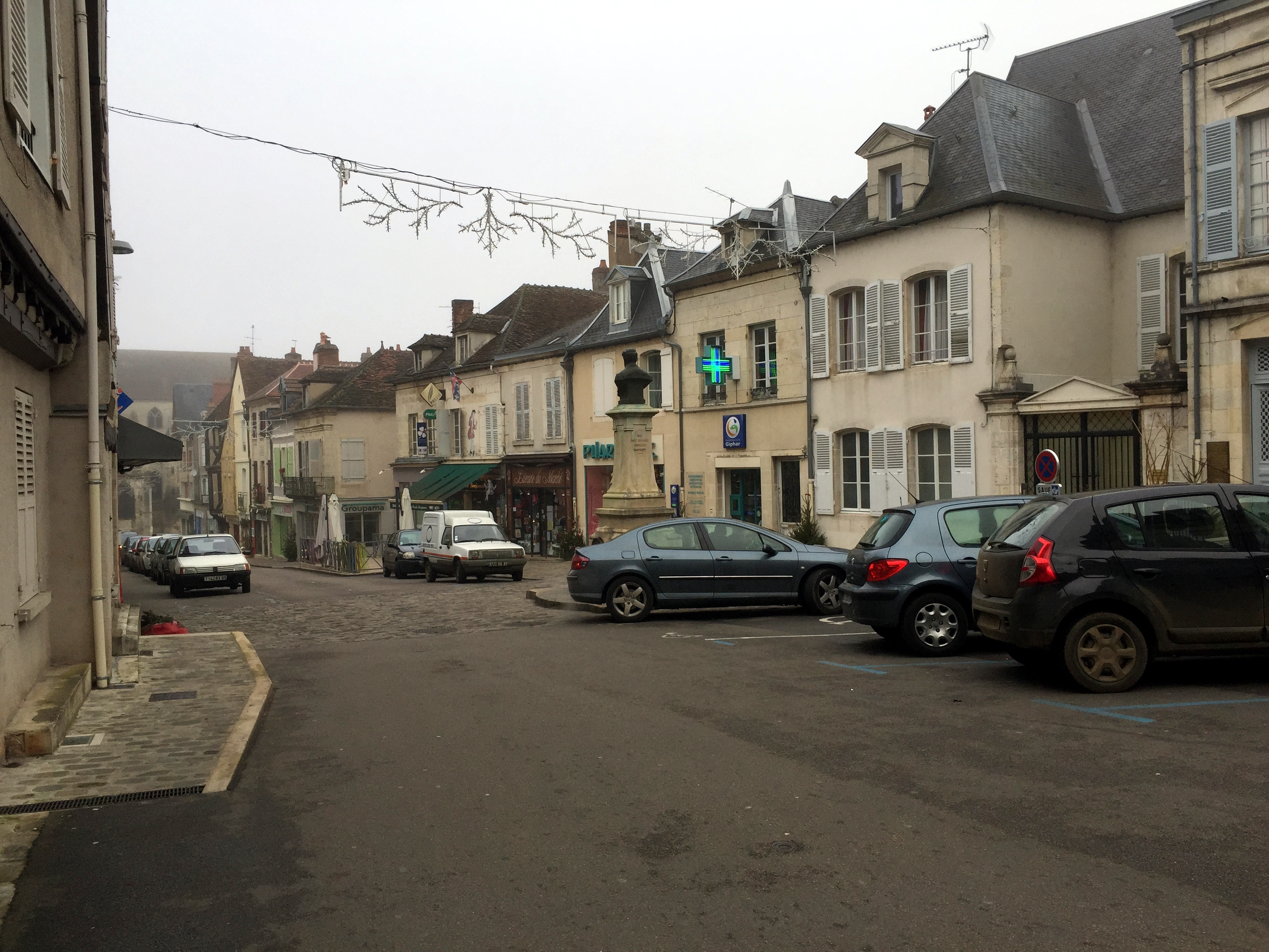 Monument à Claude Tillier à Clamecy.